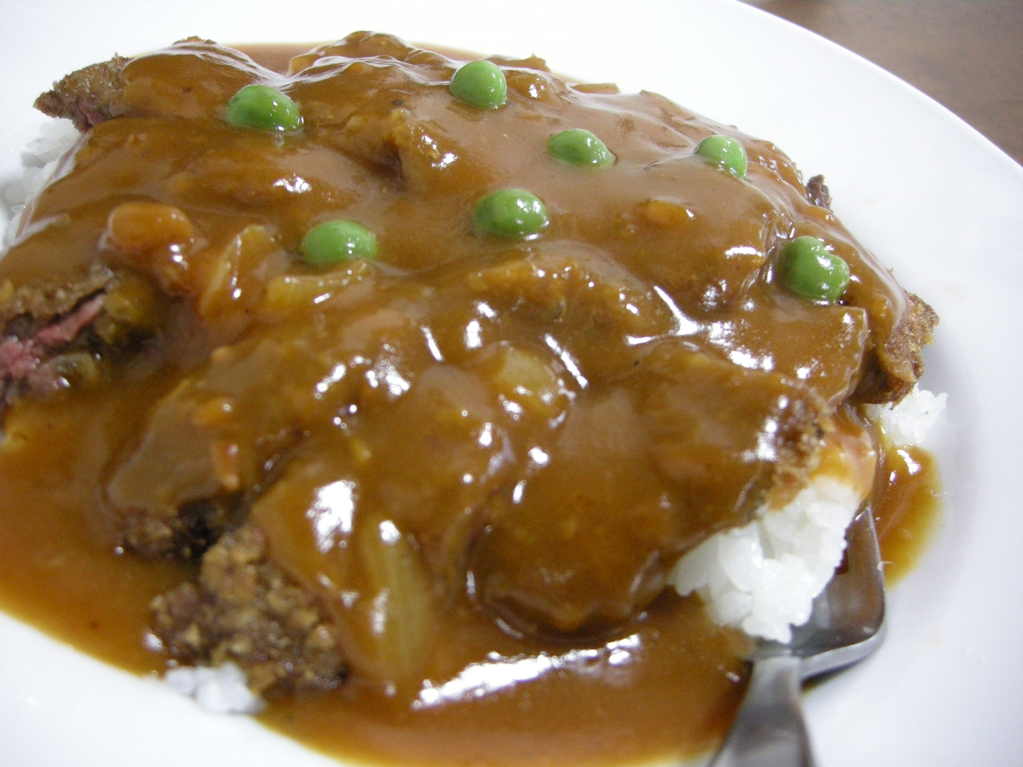 懐かしの味